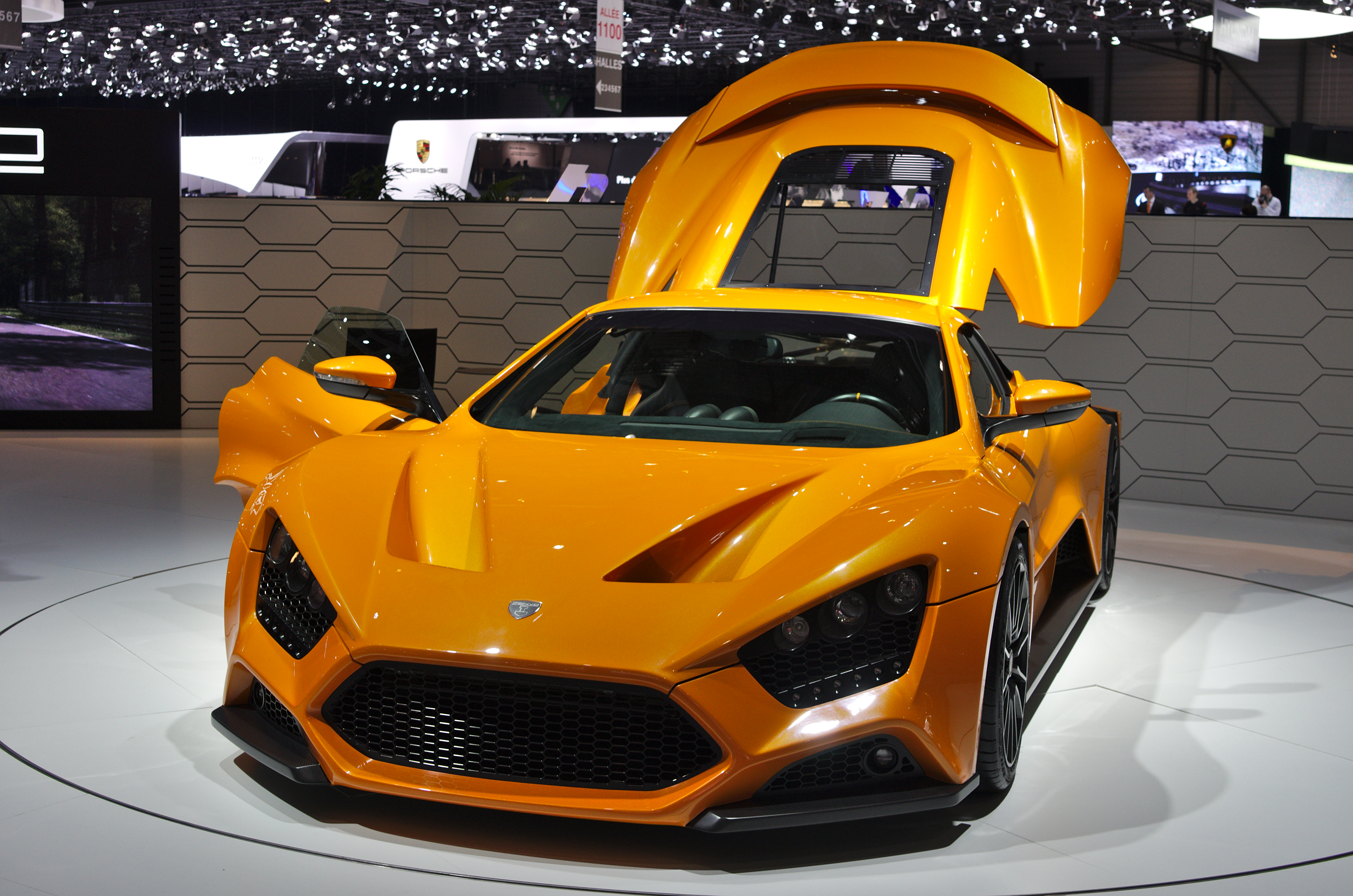 Salon de l'auto de Genève 2014 - 20140305 - Zenvo ST1